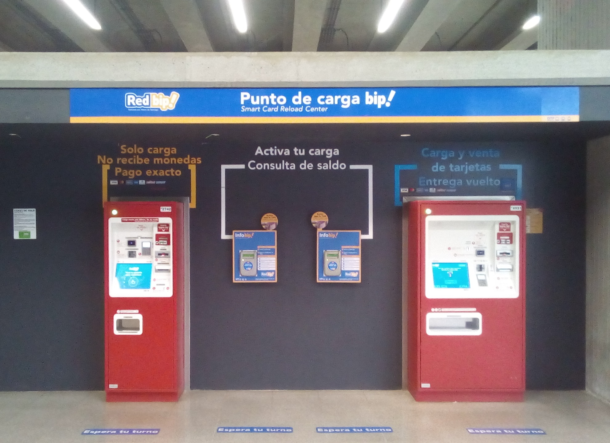 Ejemplo de un "Punto de carga bip" en la estación Estadio Nacional de la Línea 6 del Metro de Santiago, con 2 tipos de máquinas de autoservicio y 2 tótems infobip.